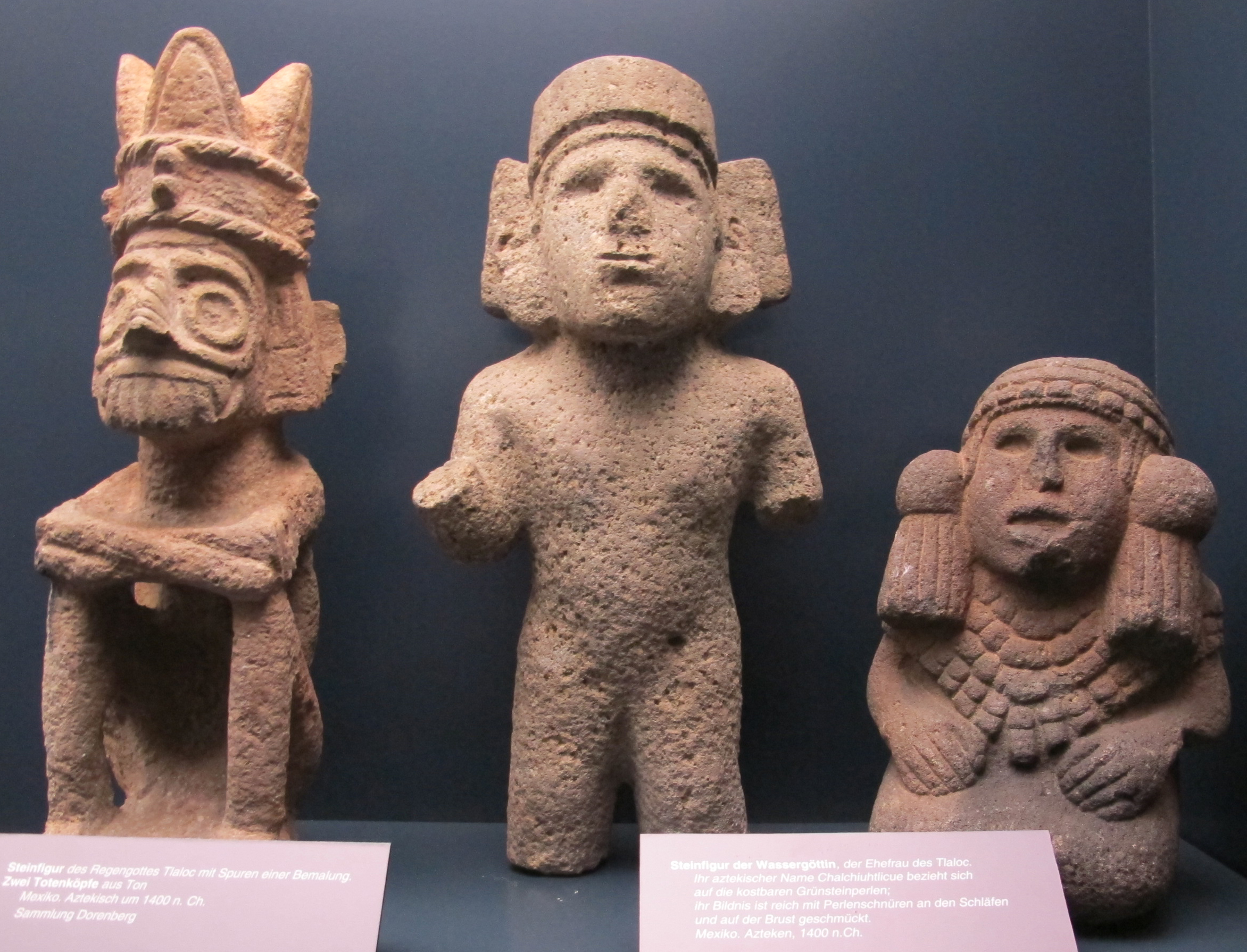 Massico, figurine atzeche, 1400 ca